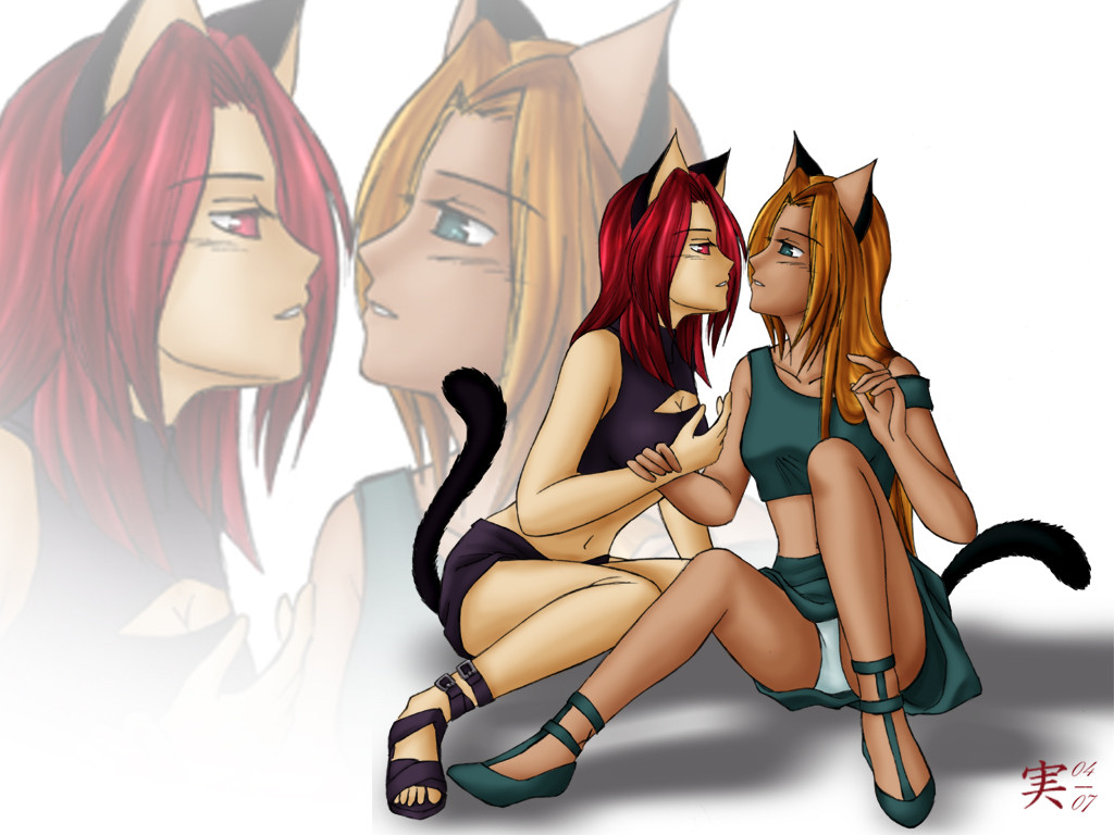 3. Platz des Wikipedia-Wettbewerbs bei Animexx in der Kategorie Genre als Illustration für Yuri.